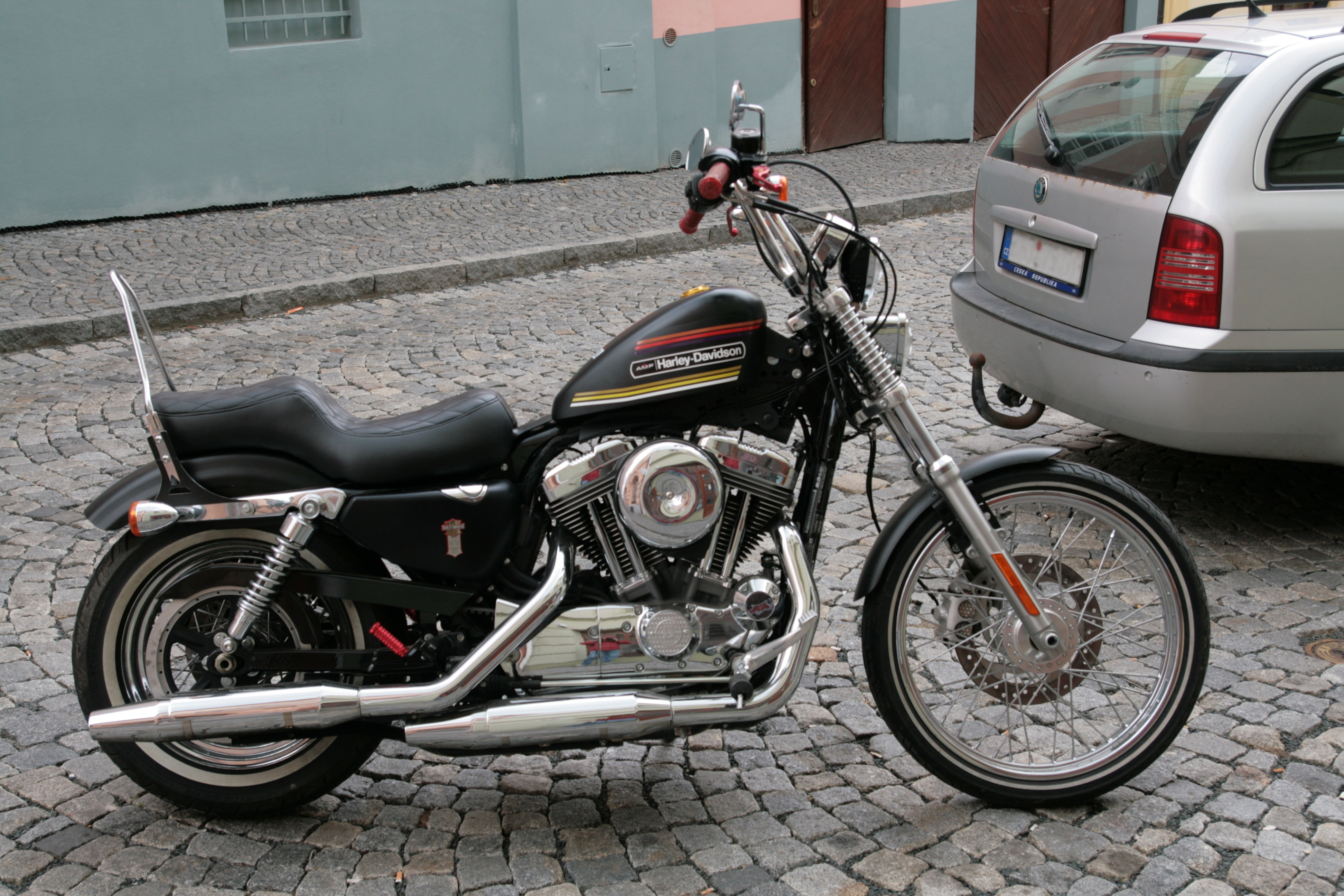 Město Domažlice. Motocykl Harley-Davidson v Branské ulici.